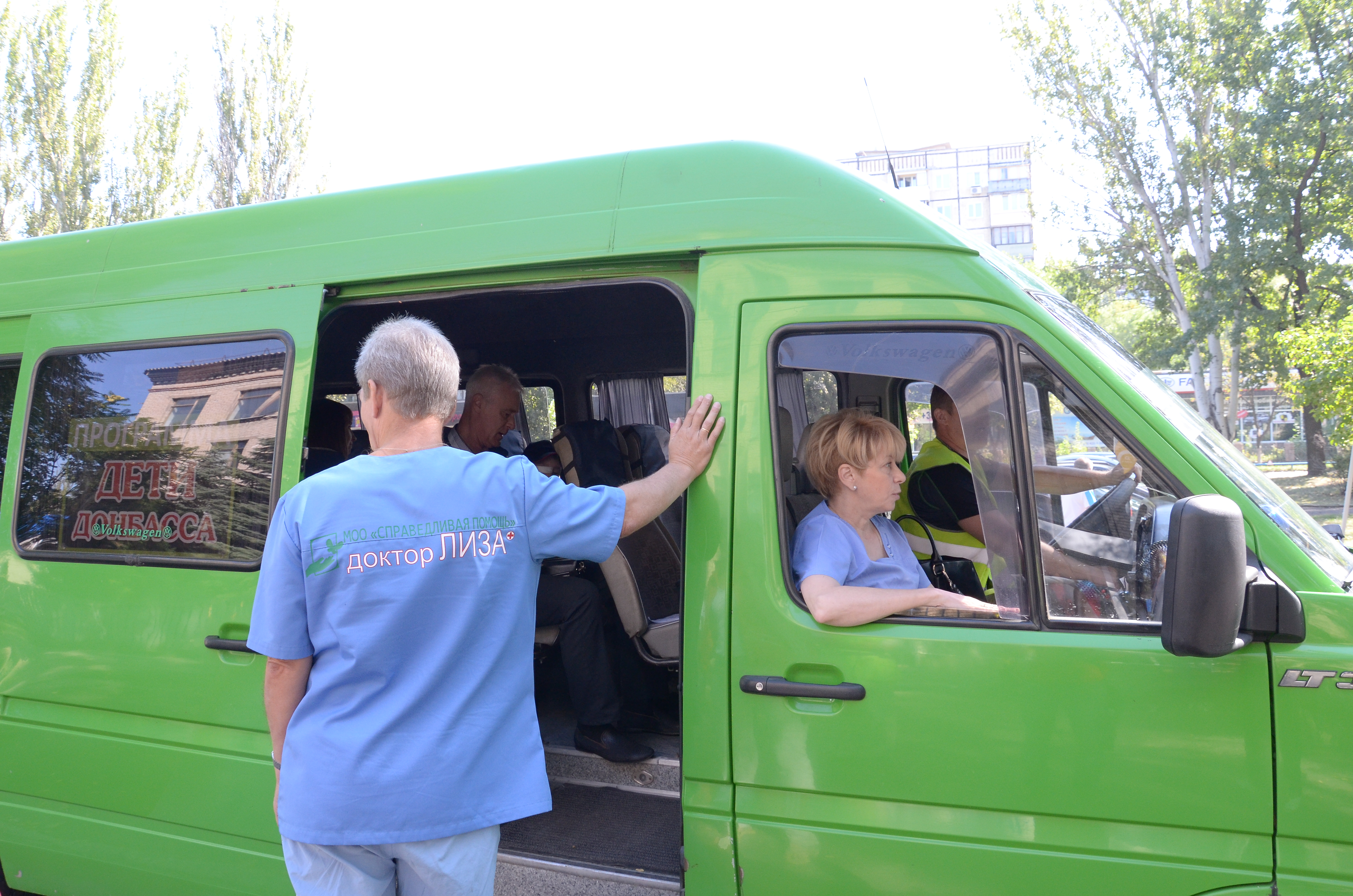 Эвакуация детей из Донецка на лечение в Москву